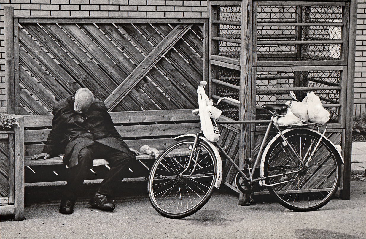 En gammal hemlös man vilar/sover på en bänk i centrala Malmö 1984, vid sidan om står hans cykel (olåst) med några få ägodelar.